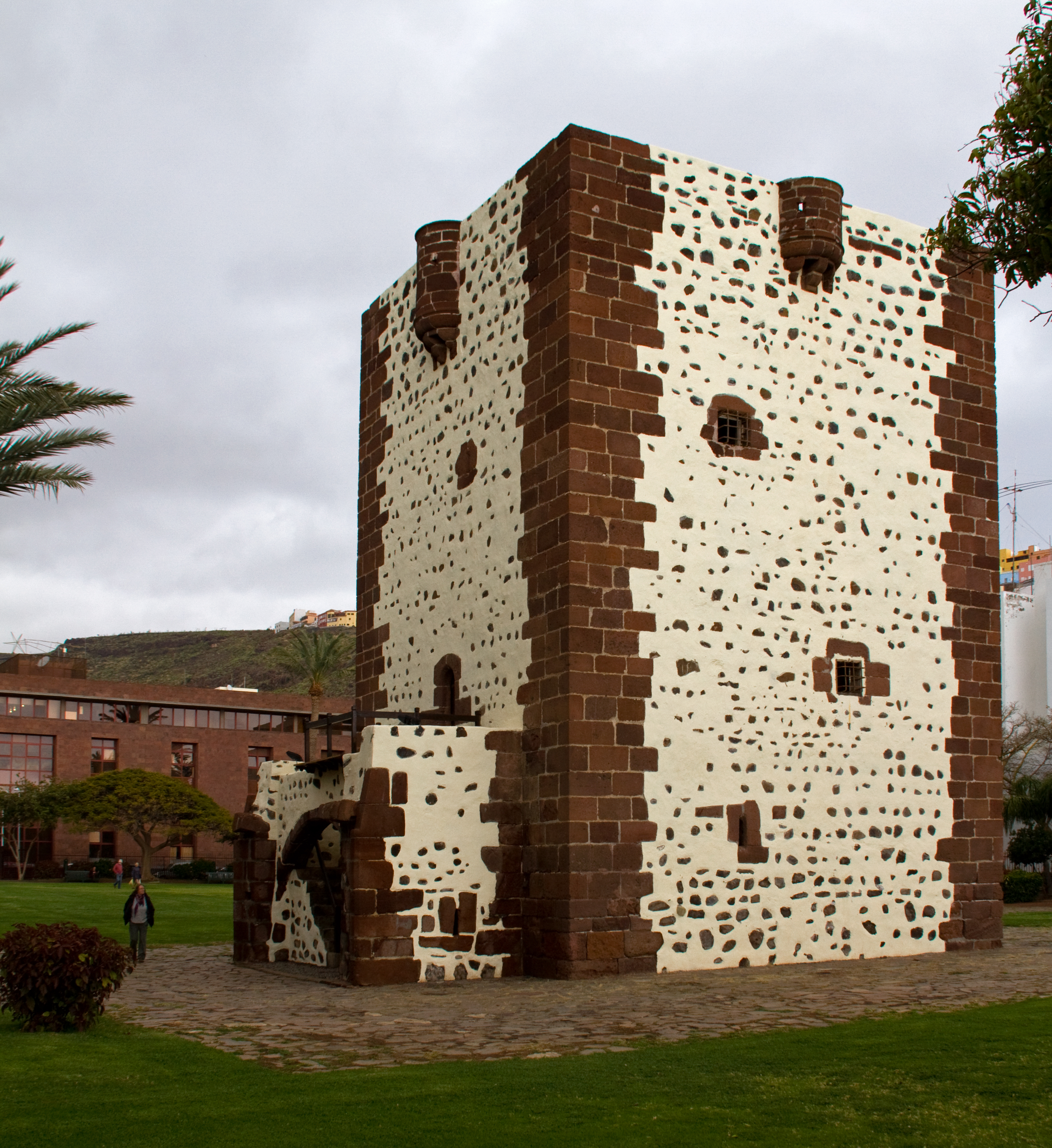 del Conde 2